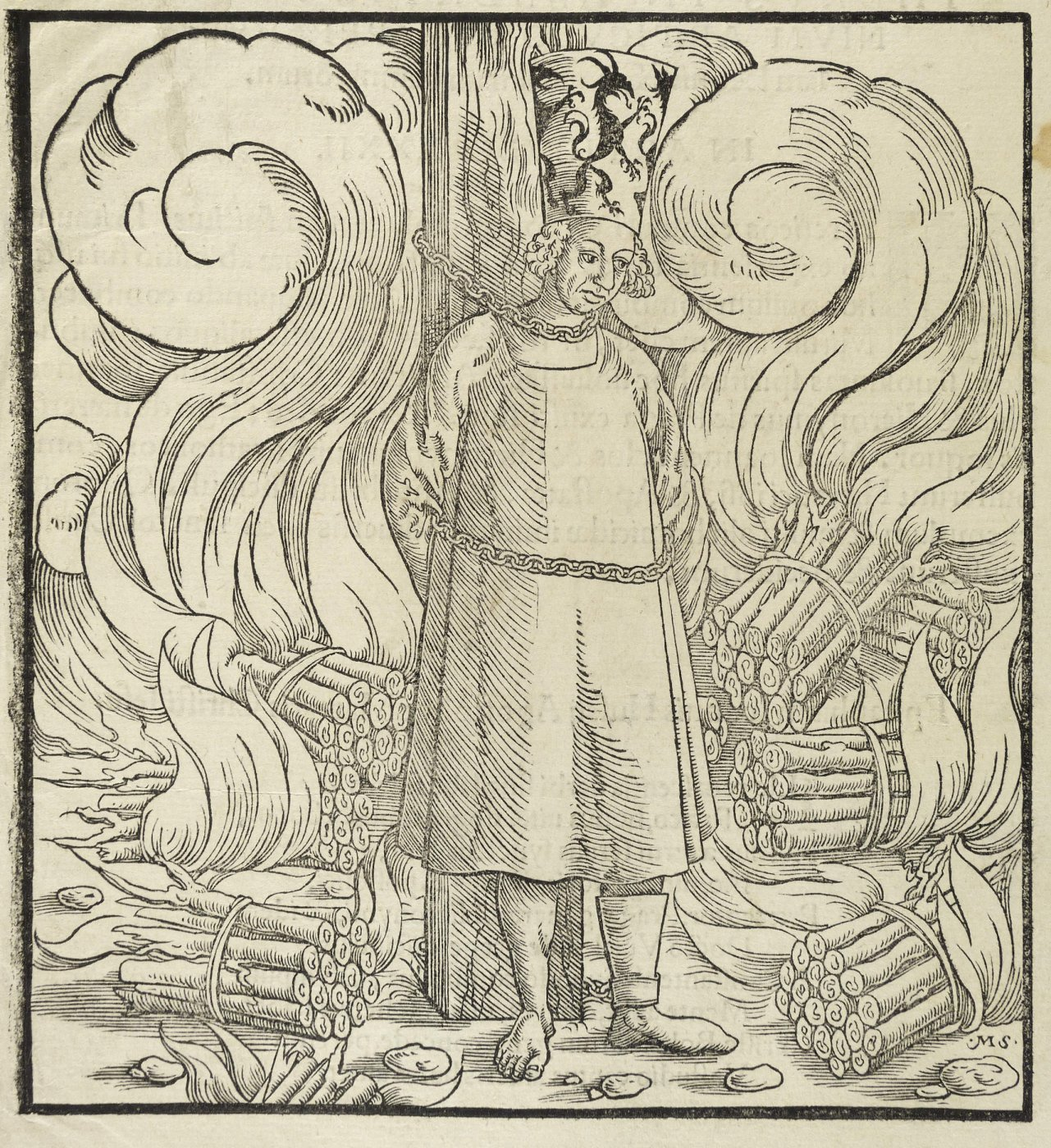 Dřevoryt z Husovy Postilly, otištěné v Praze roku 1563